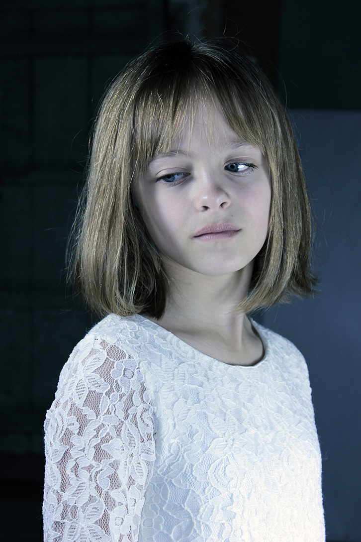 Portrait - Décembre 2015